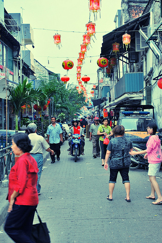 bahasa Indonesianya: Pecinan